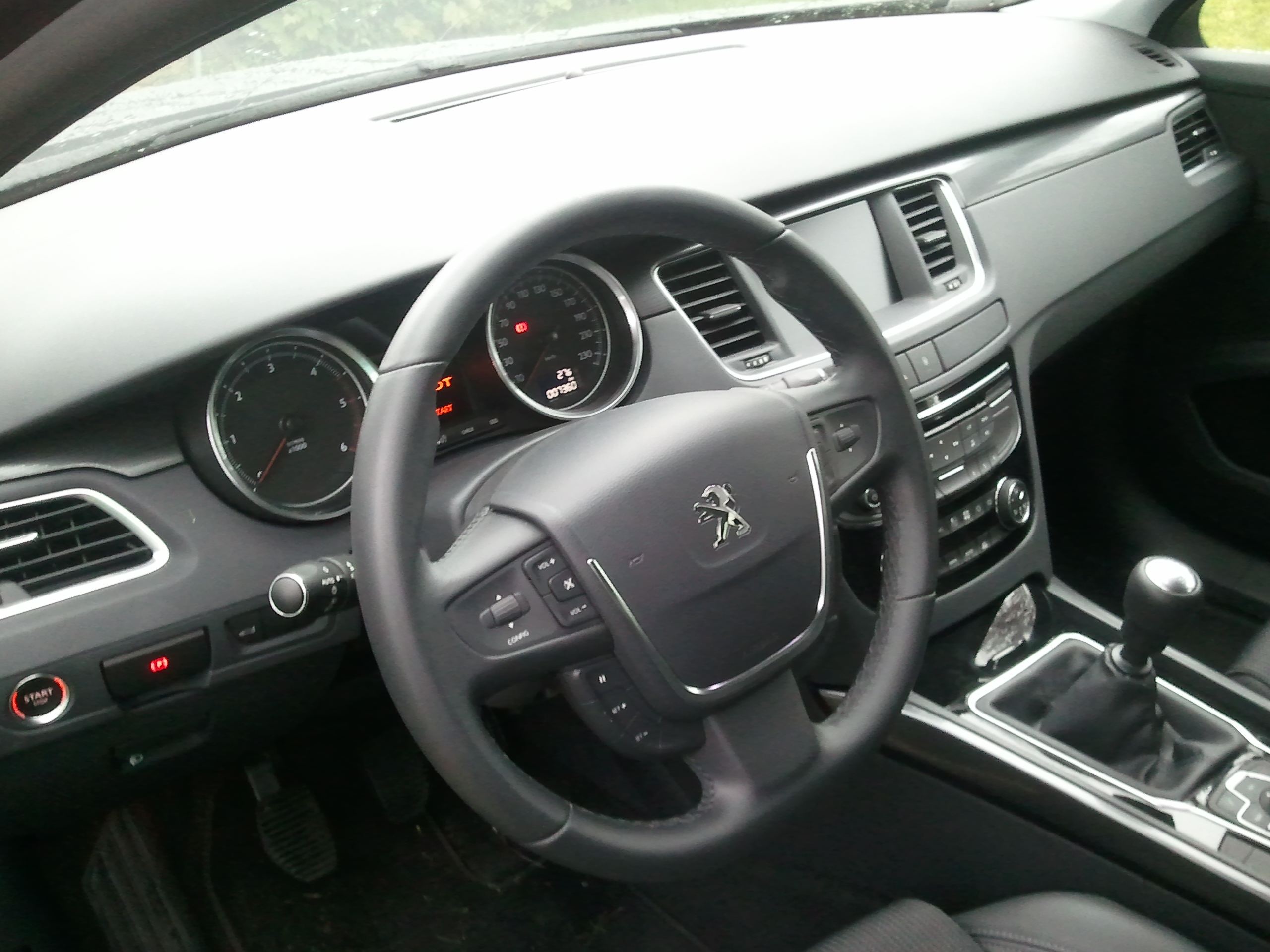 Tableau de bord Peugeot 508